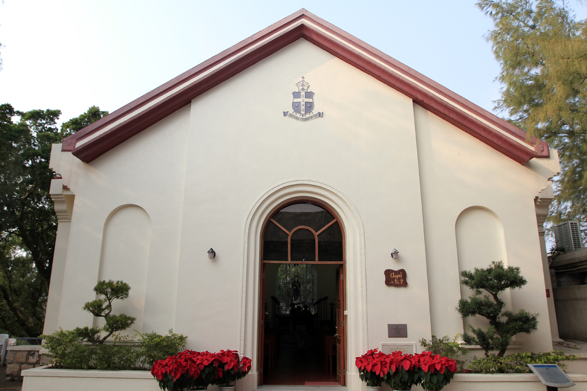 聖士提反書院